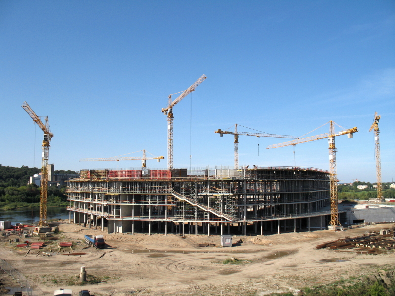 Kauno arena.